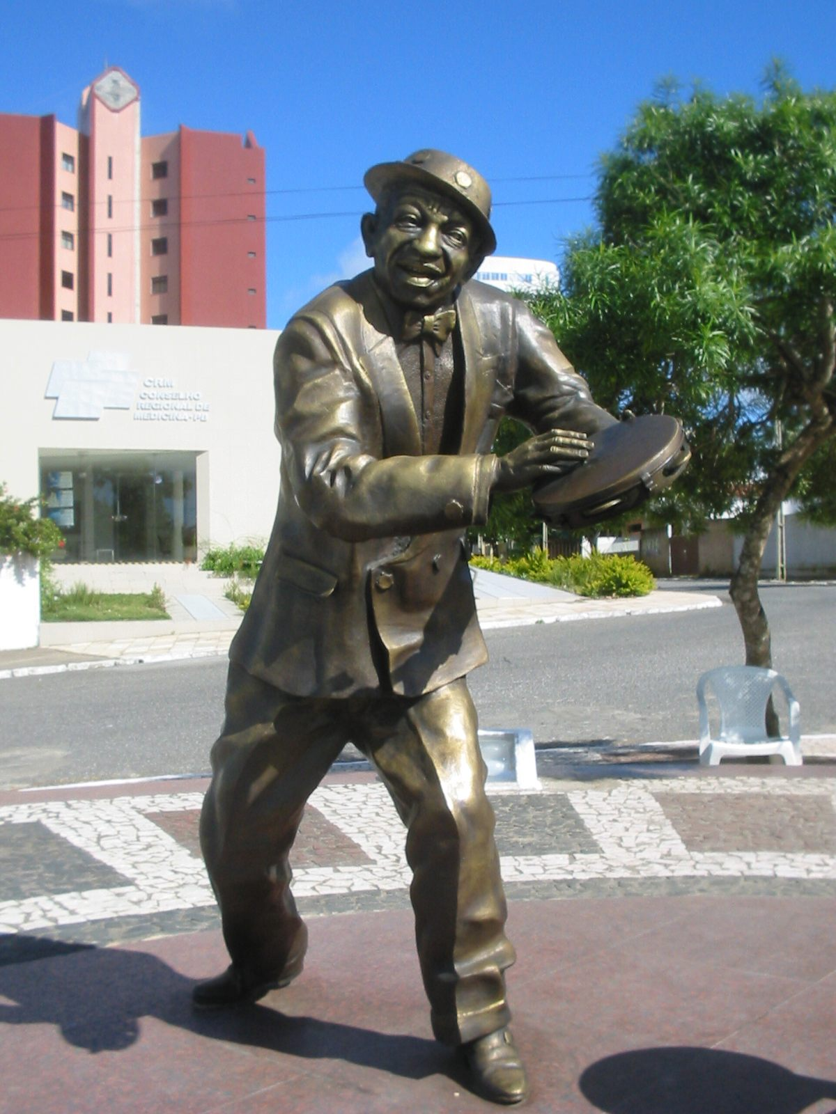 Campina Grande (Paraíba), Brasil. Estátua de bronze de Jackson do Pandeiro. Statue of Jackson do Pandeiro. Campina Grande (Paraíba), Brazil.